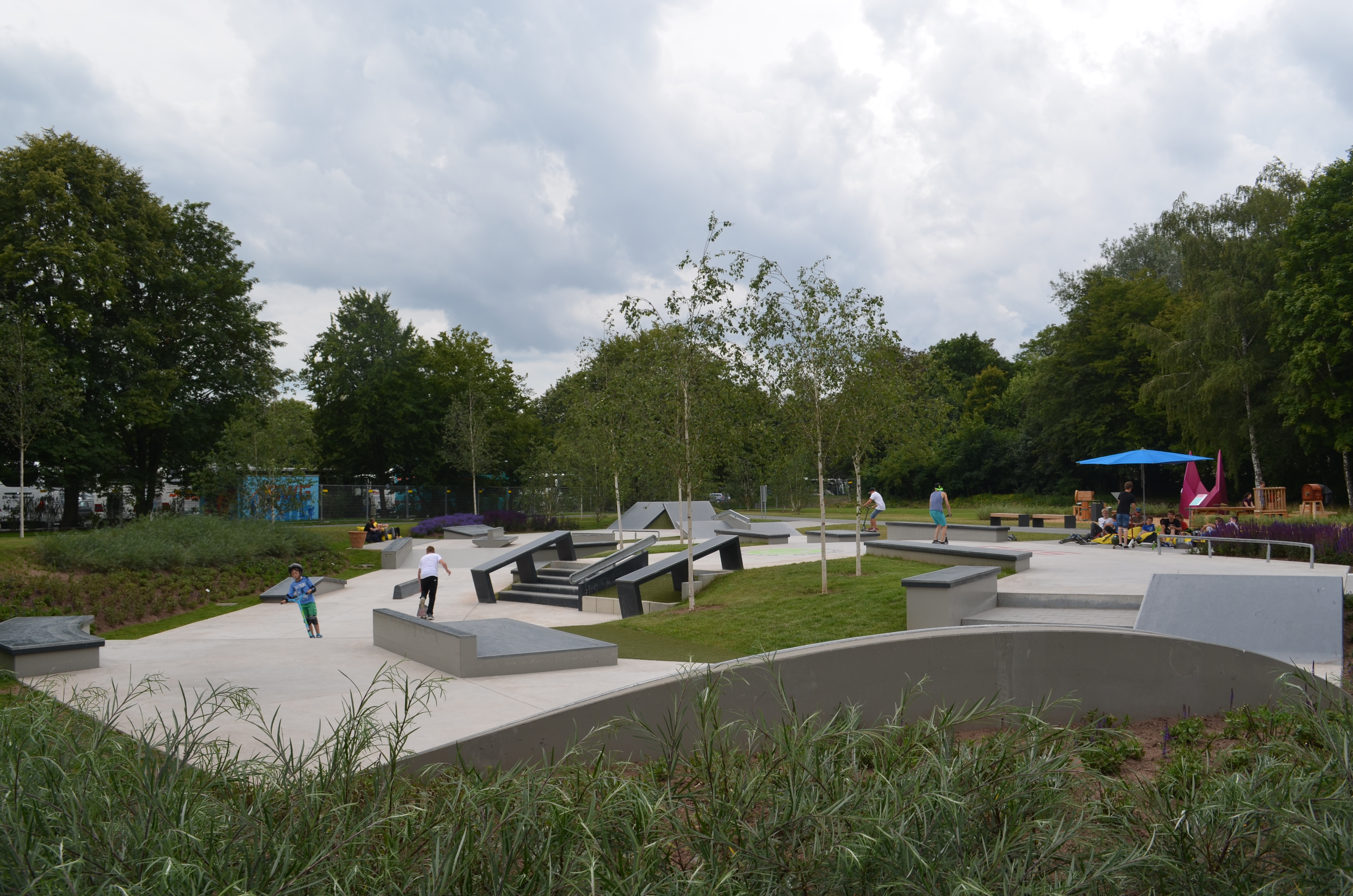 Gießen, Landesgartenschau, Wieseckaue, Skateranlage